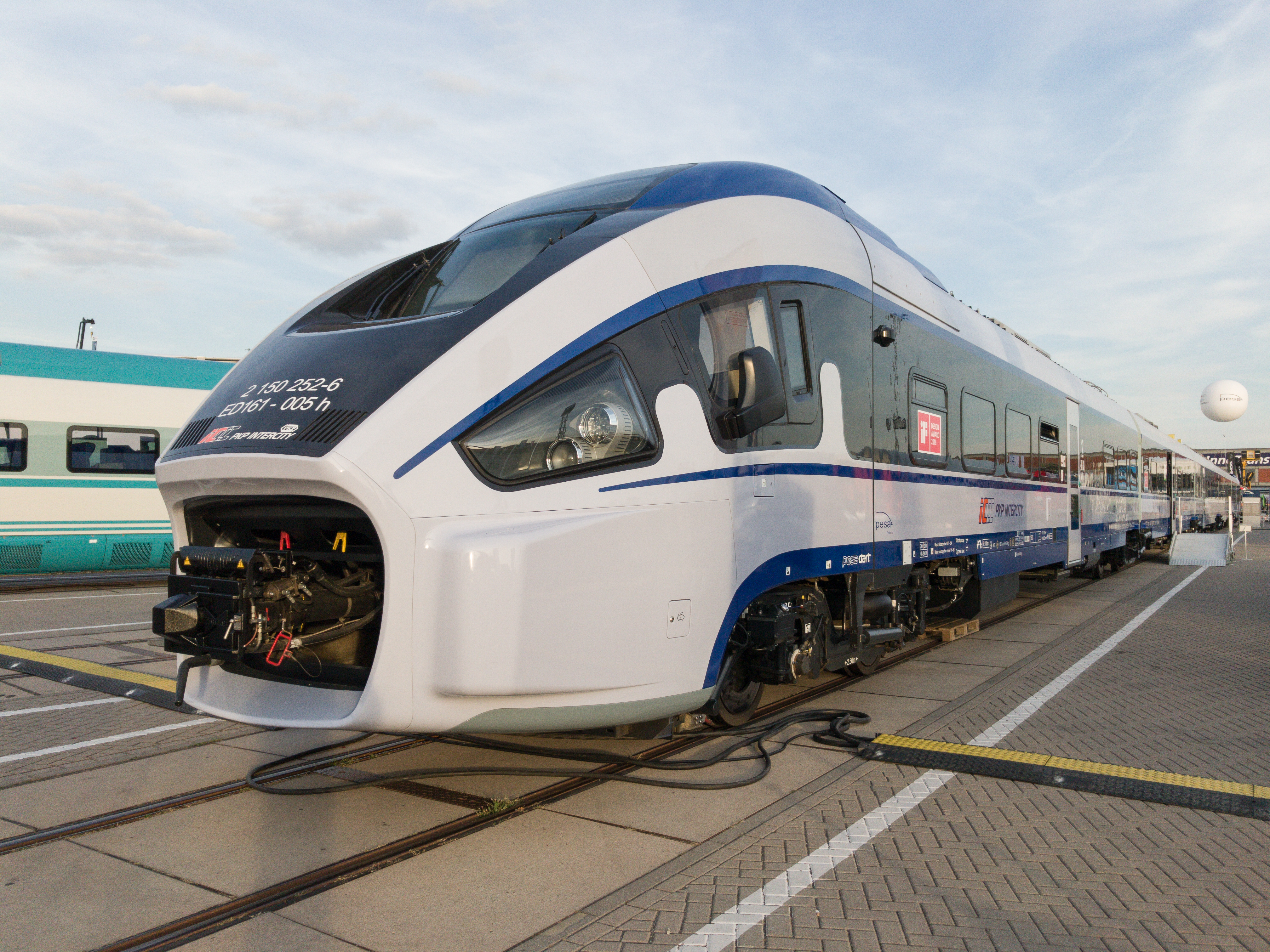 Pesa Dart ED161 of PKP Intercity - innoTrans 2016